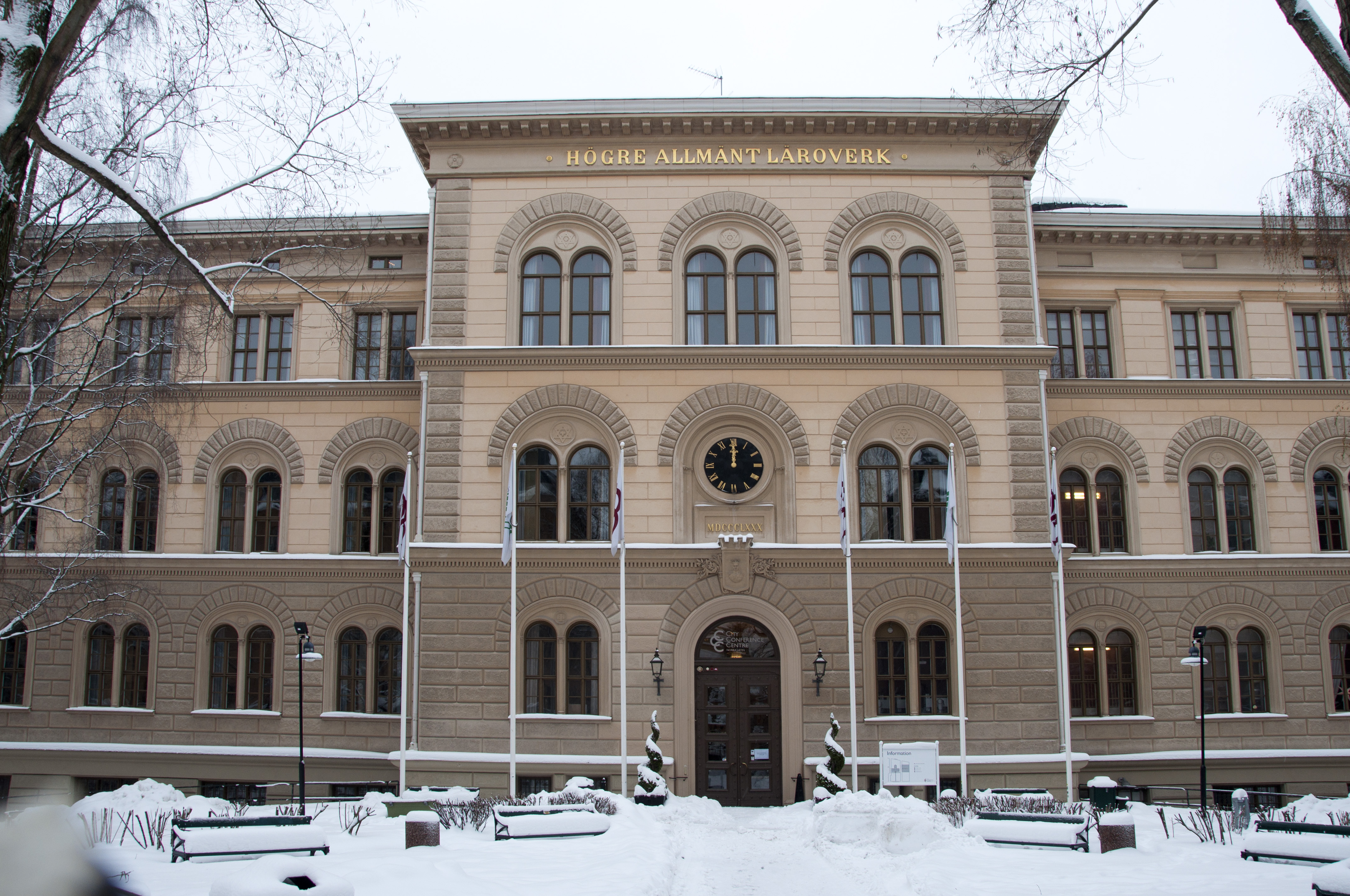 Norra Latin, fasad mot Drottninggatan